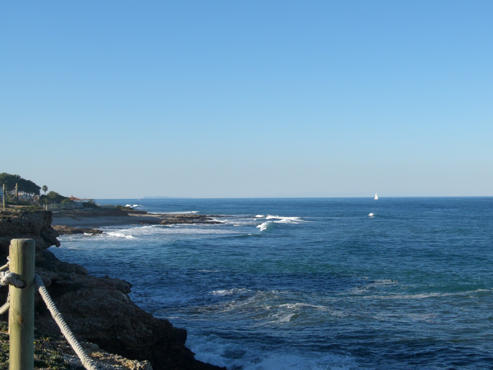 Calas de Denia Denia (Alicante) little beaches